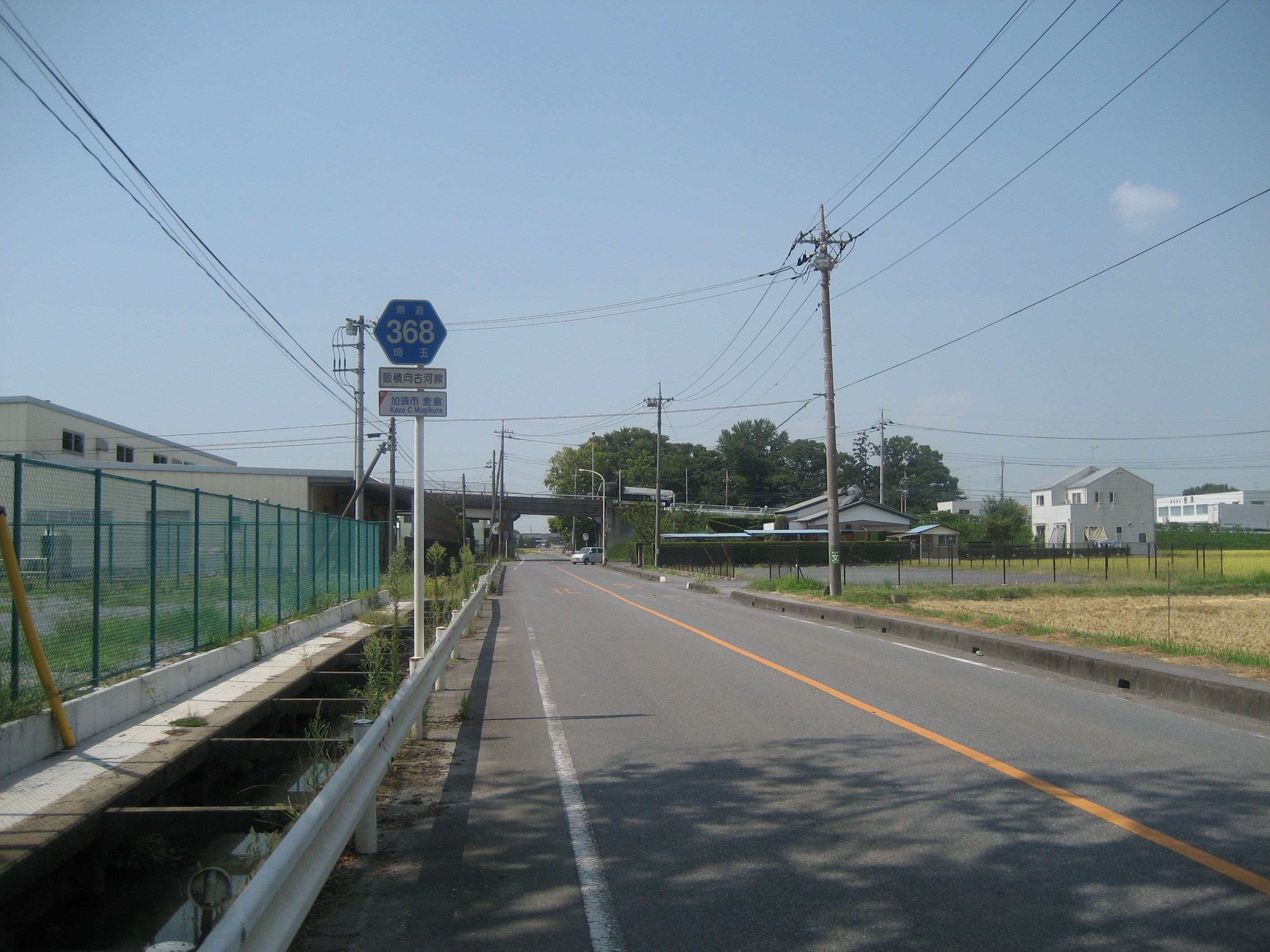 埼玉県道368号線加須市内（旧北川辺町内）